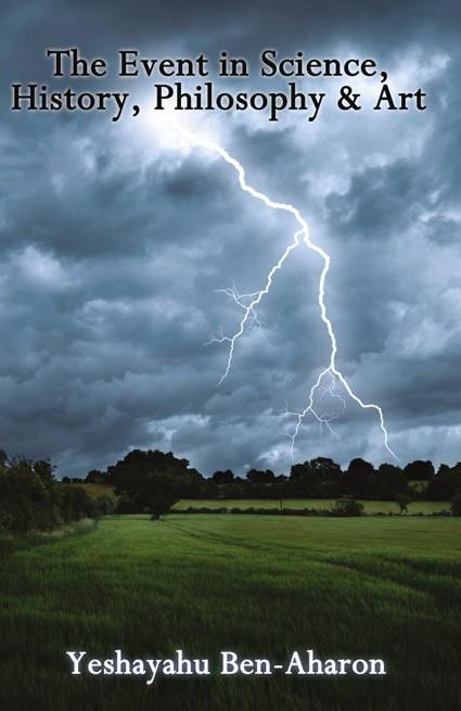 מחשבת האירוע במדע, היסטוריה, פילוסופיה ואמנות